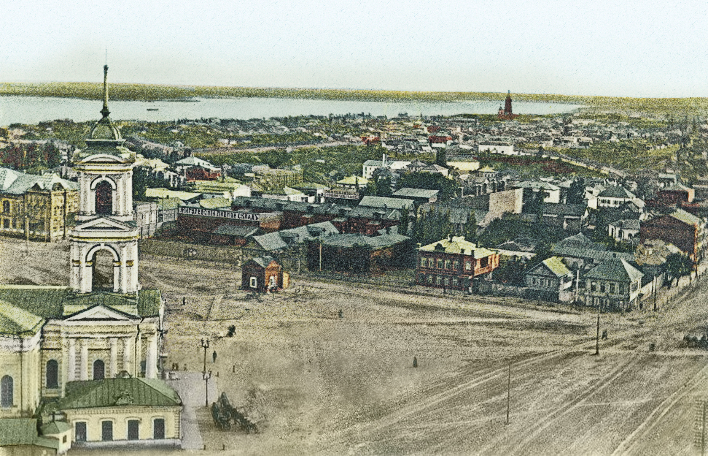 Комплекс Жигулёвских пивных складов Товарищества Жигулевского пивоваренного завода А.Вакано и Ко в Царицыне (конец XIX века).